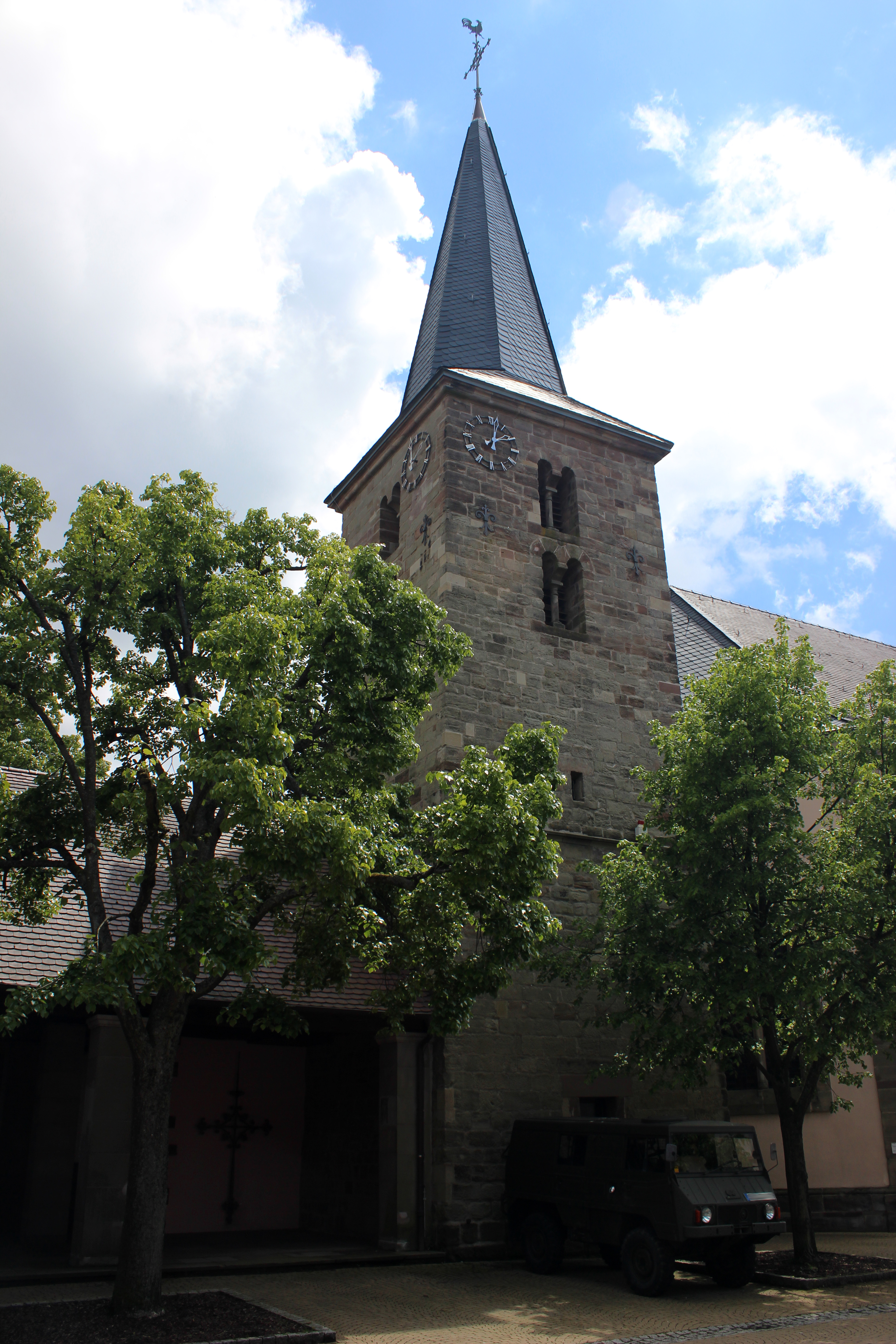 Die katholische Pfarrkirche St. Martin in Berus, einem Ortsteil der Gemeinde Überherrn, Landkreis Saarlouis, Saarland